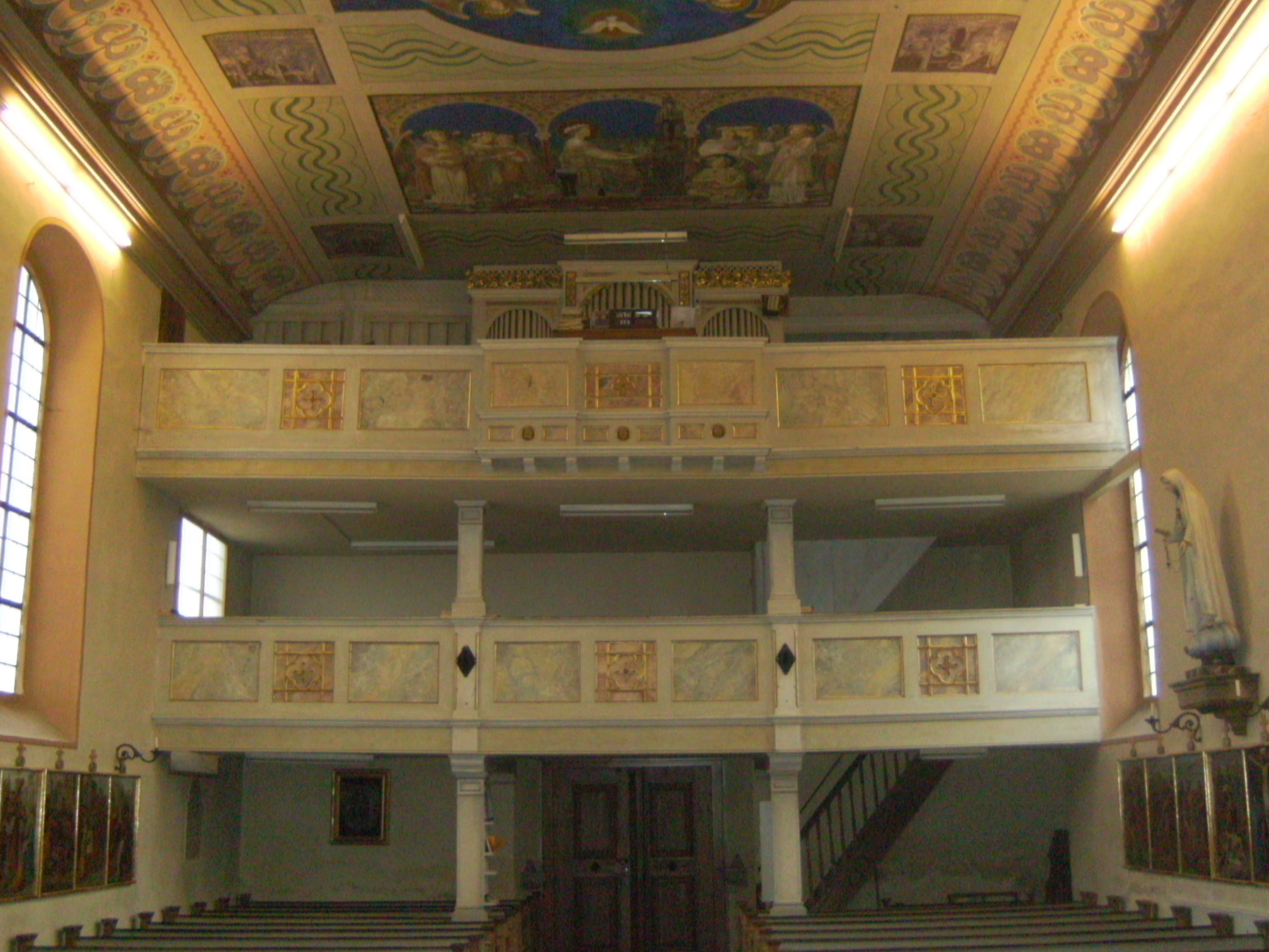 Pfarrkirche St. Martin in Kellmünz an der Iller